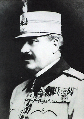 Generalul Traian Moșoiu.